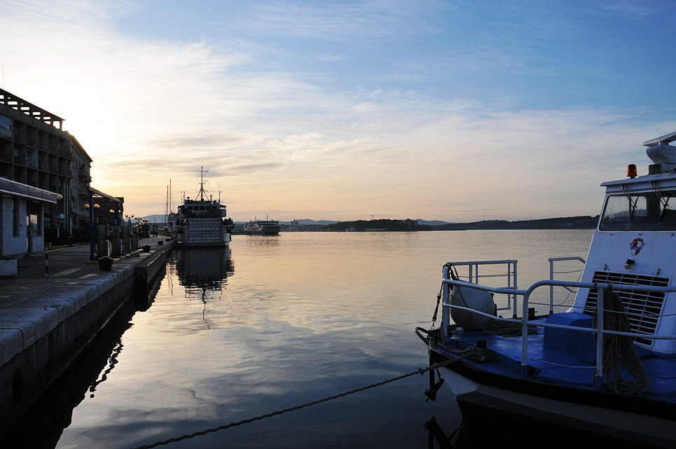 Sunrise in Šibenik